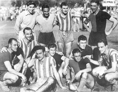 Futbolistas de Central y Newell's posan juntos en la previa de un clásico.